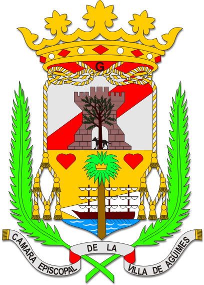 Escudo municipio de Agüimes, Gran Canaria.